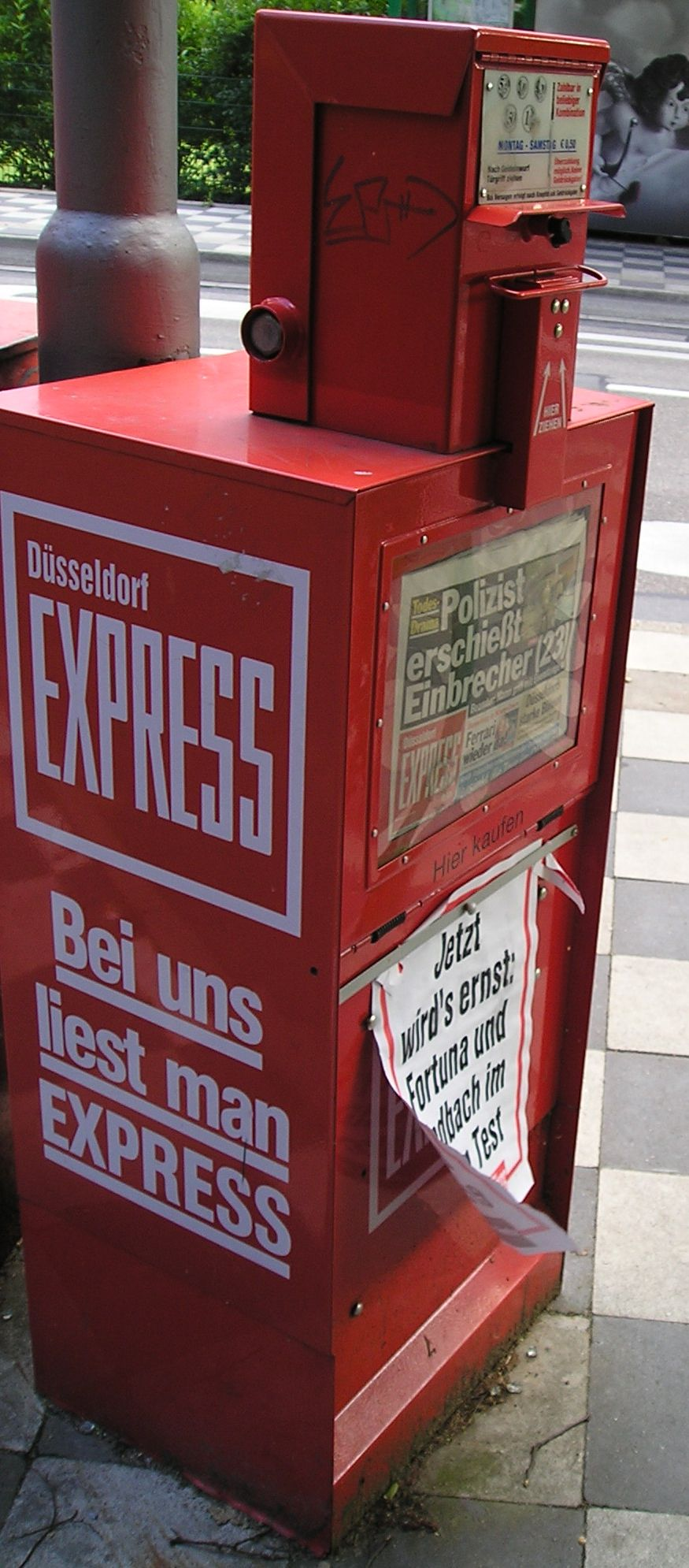 Express-Zeitungsautomat